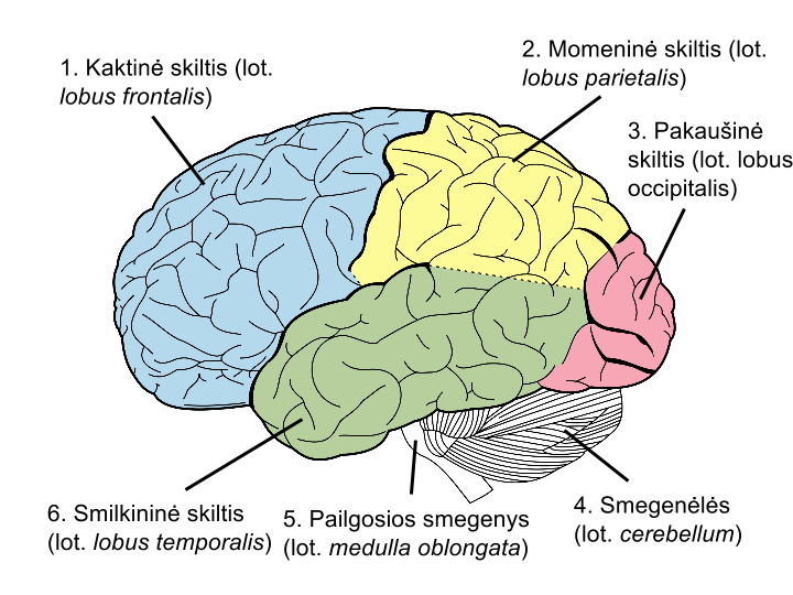 Placebo efektas veikia beveik visas smegenų sritis